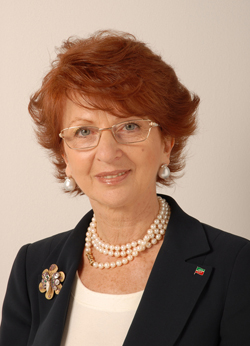 politica italiana